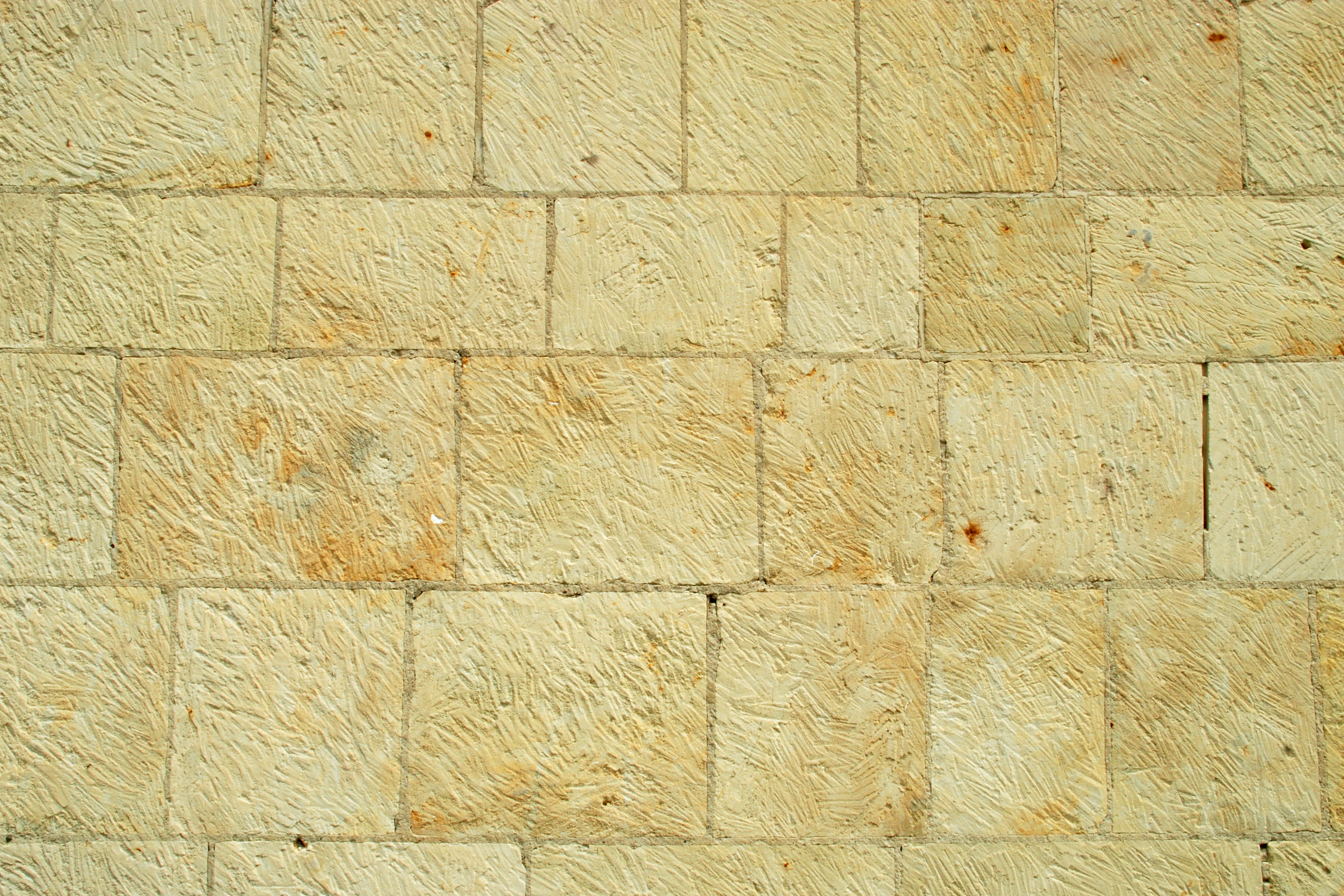 Belgique - Brabant wallon - Hélécine - Linsmeau - Chapelle Notre-Dame de la Colombe